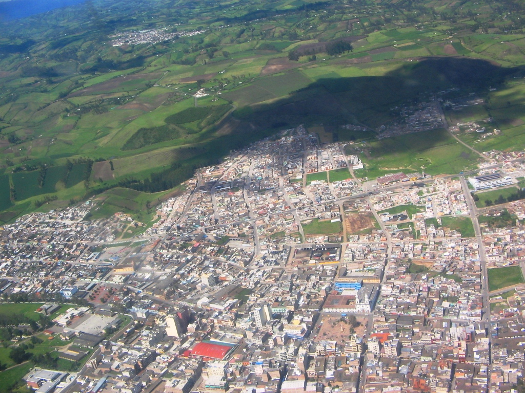 Foto aerea de la ciudad de Ipiales, se puede apreciar el Parque la Pola, donde se encuentra la Iglesia de San Felipe Neri y el colegio del mismo nombre. Al rededor del parque quedan importantes establecimientos como el Centro Comercial Estrella, también algunos bancos y cafeterias